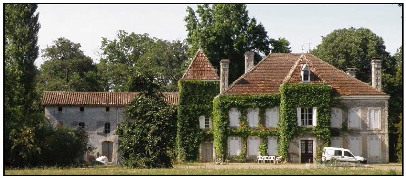 Le château privé de Loustanau du XVIIIème s. qui fut habité par le baron de Batz, proche de Louis XVI